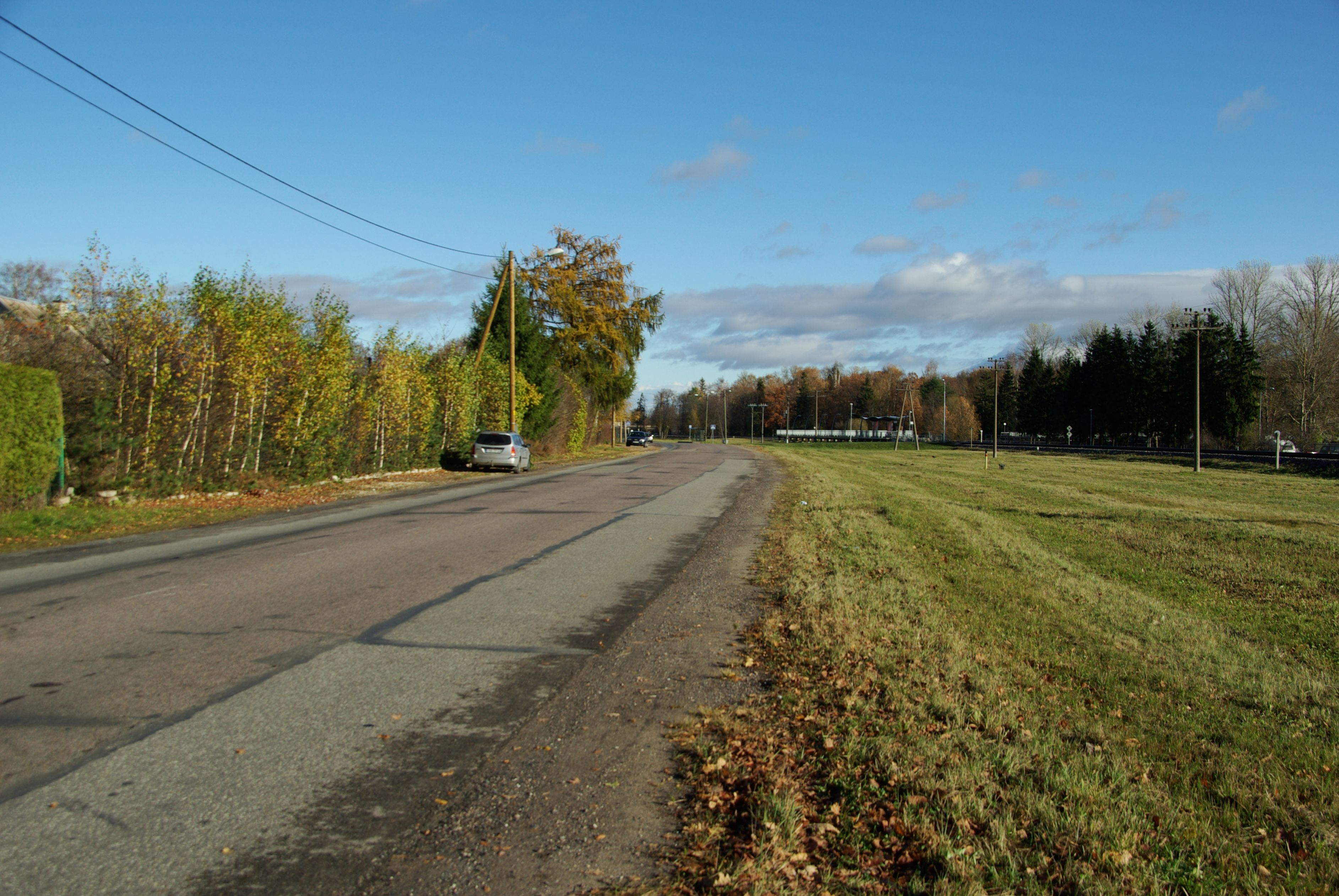 tänav Tartus Tammelinnas